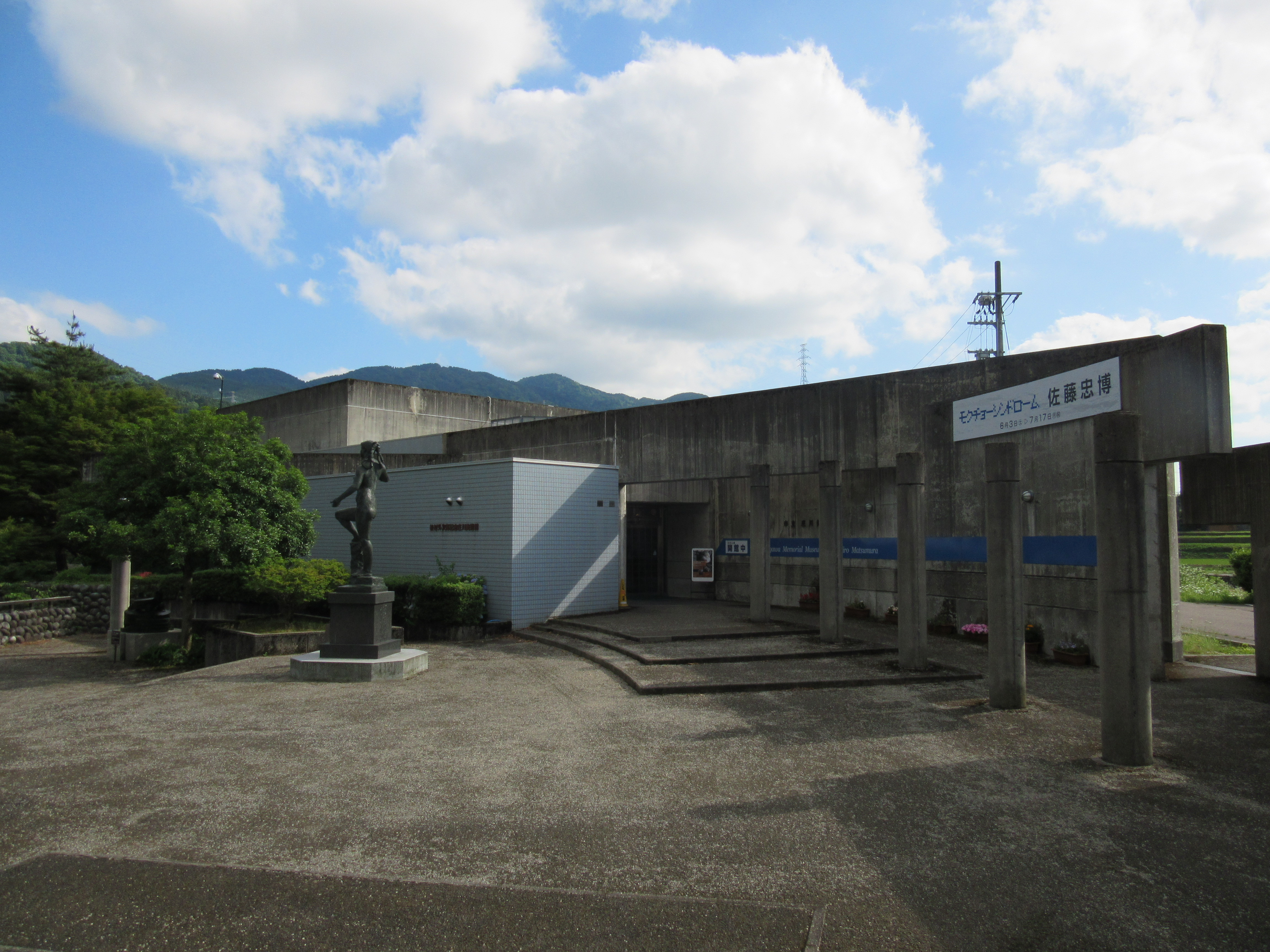 松村外次郎記念庄川美術館